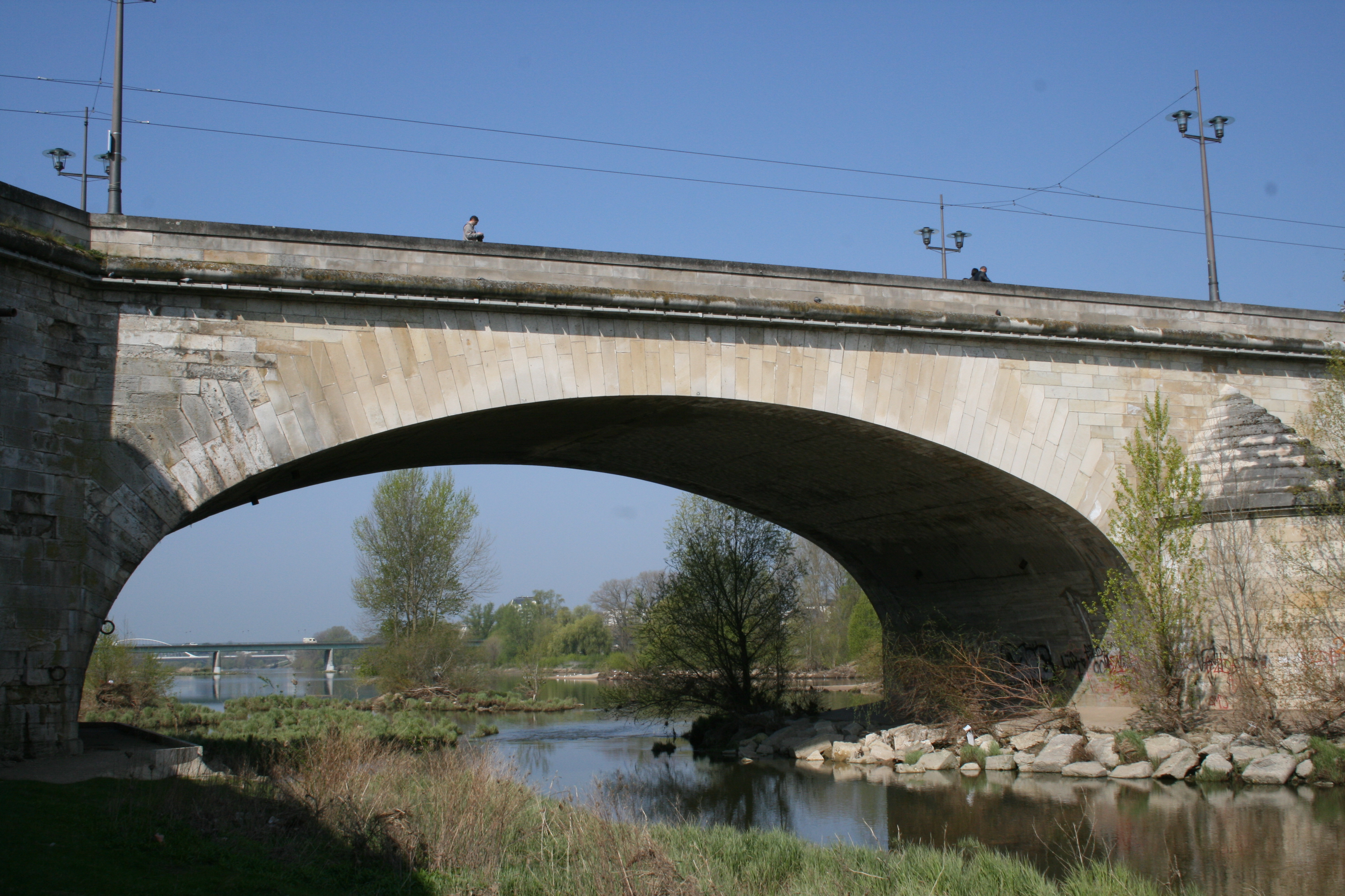 Arche 9 rive gauche, côté sud, Pont George V, Orléans, Loiret, France